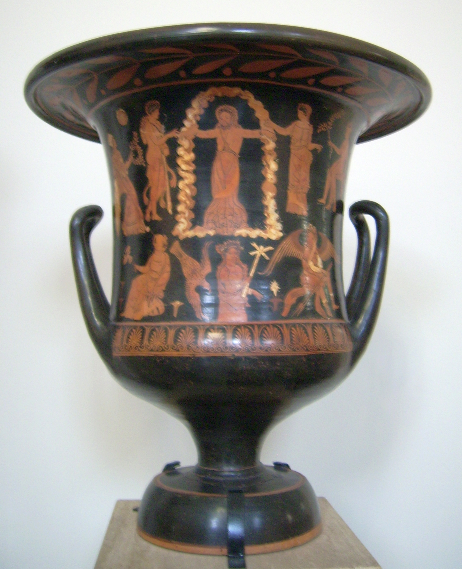 Befreiung des Prometheus auf einem apulisch-rotfigurigen Kelchkrater mit aufgesetzten Farben des Branca-Malers, um 350/25 v. Chr., Antikensammlung Berlin/Pergamonmuseum, Inventarnummer 1969,9, Höhe 57 cm, erworben 1969